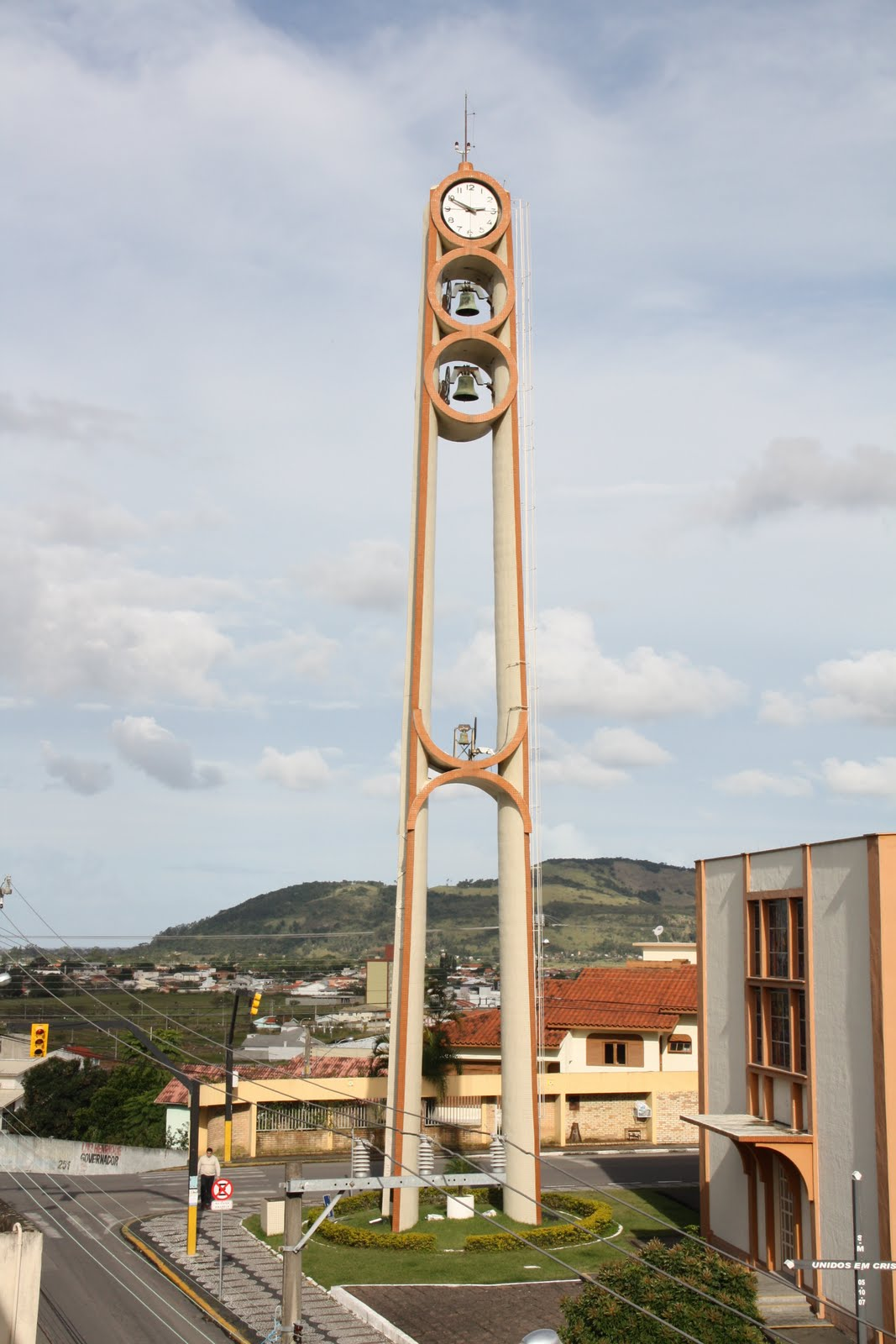 Relógio e sino da Catedral Diocesana de Tubarão - SC